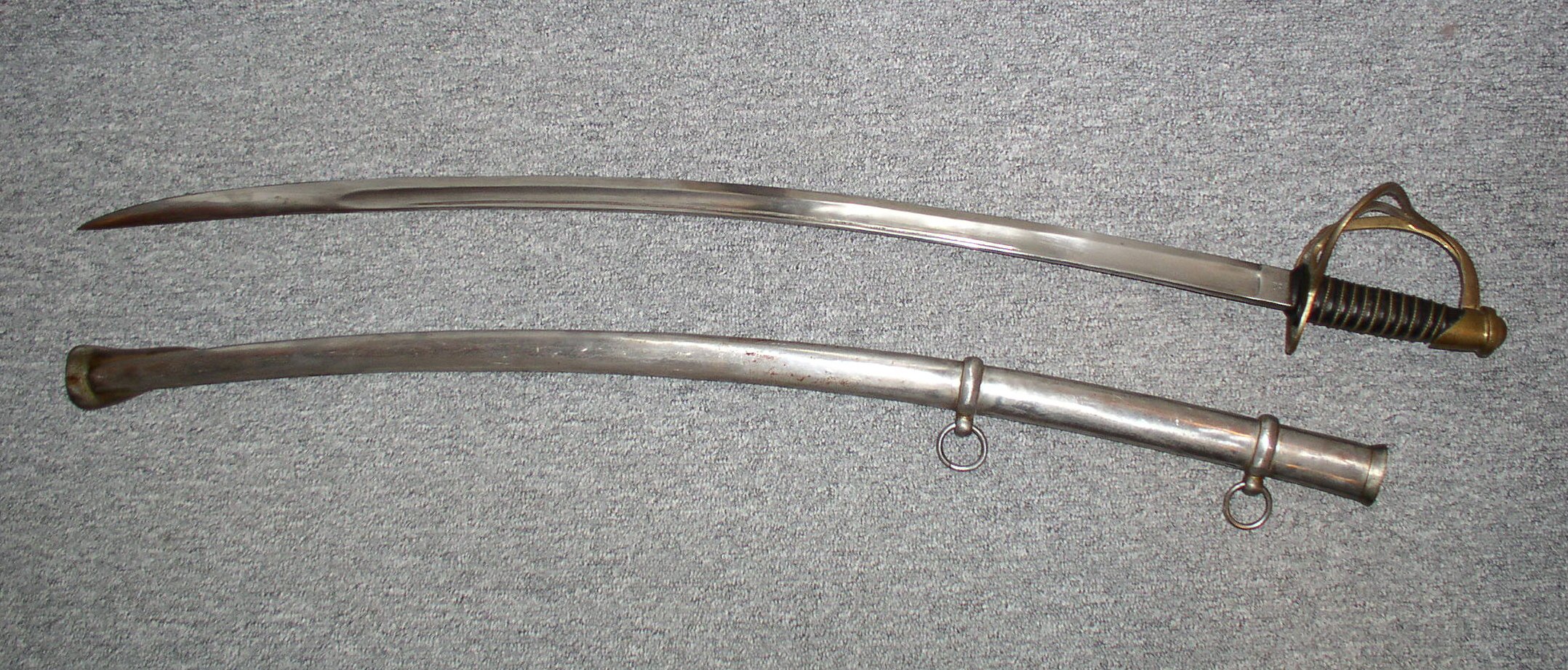 Alter US-Kavallerie Säbel mit Grabscheide von Ames Co. Chicopee (Mass.) 1862